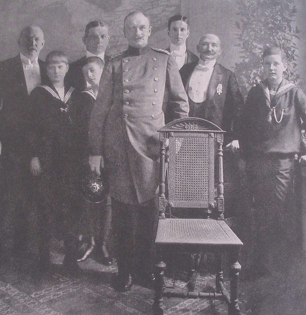 300 Jahre Familie Thorer - 50 Jahre Theodor Thorer. Seite 34. Besuch Sr. Majestät des Königs Friedrich August von Sachsen am 20. Februar 1908. ...der mit großem Interesse Kenntnis von der weltumfassenden Bedeutung der Firma und Einblick in deren sich nach Millionen bewertete Bestände nahm.